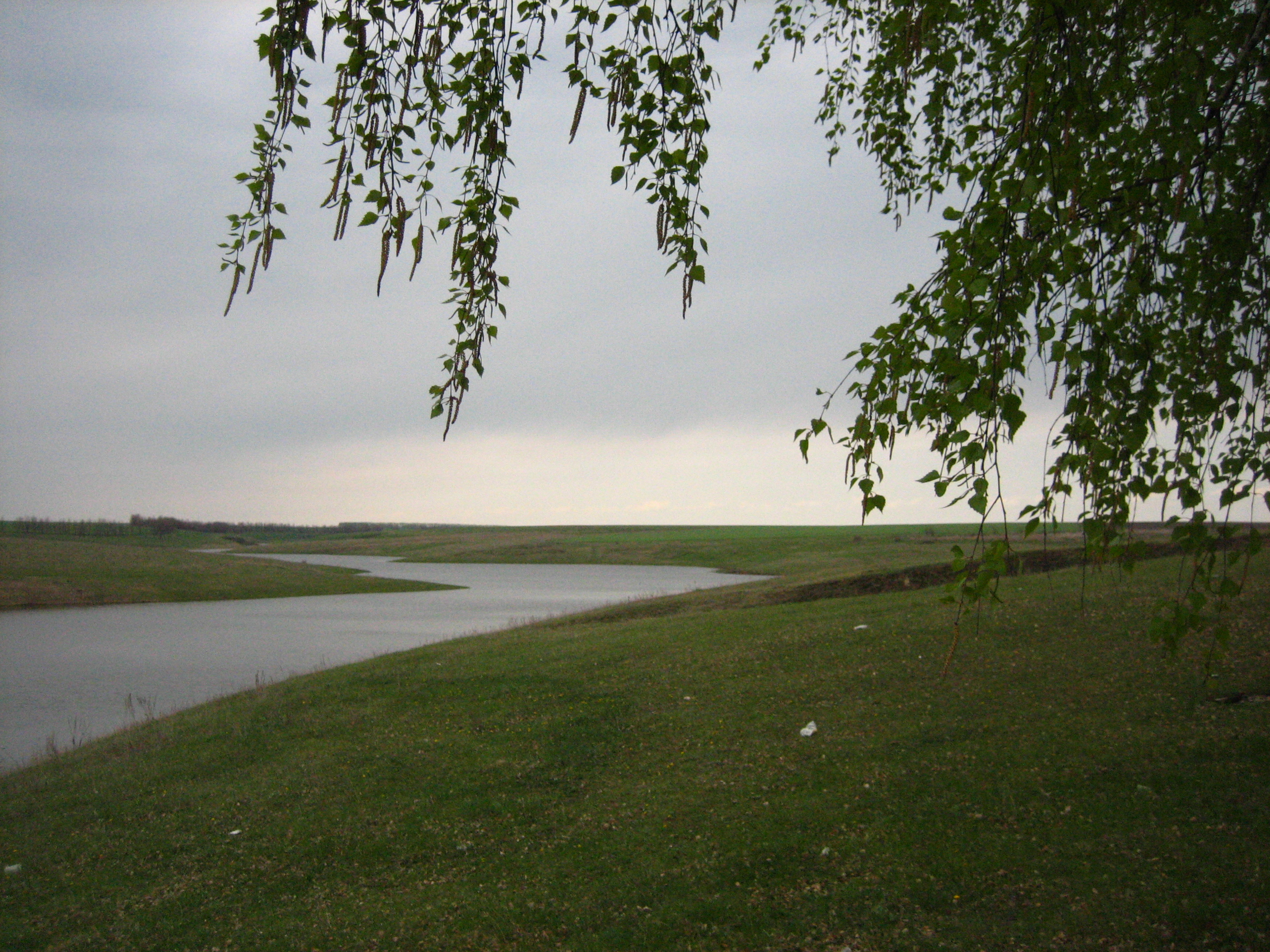 родные просторы...